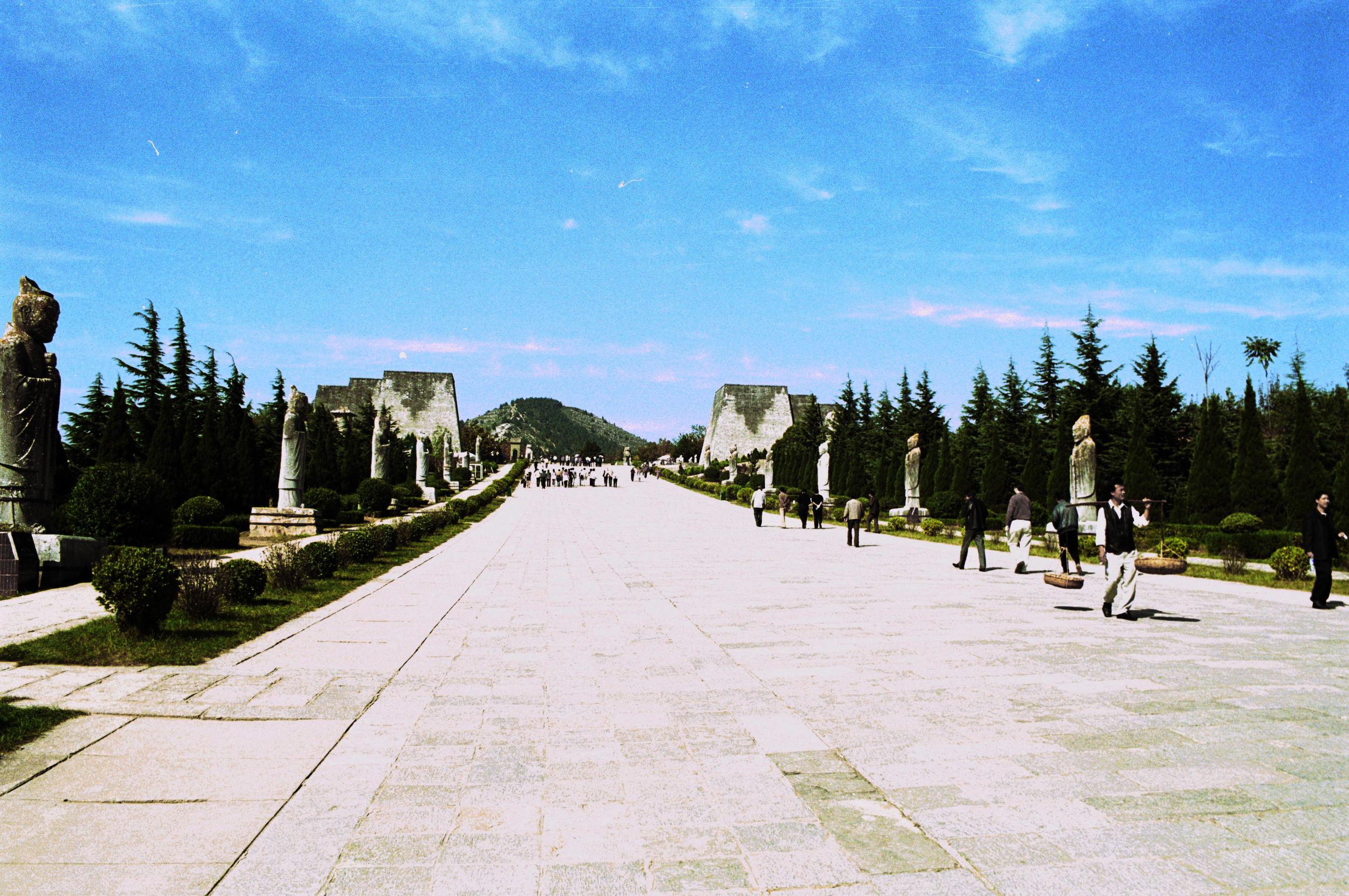 乾陵